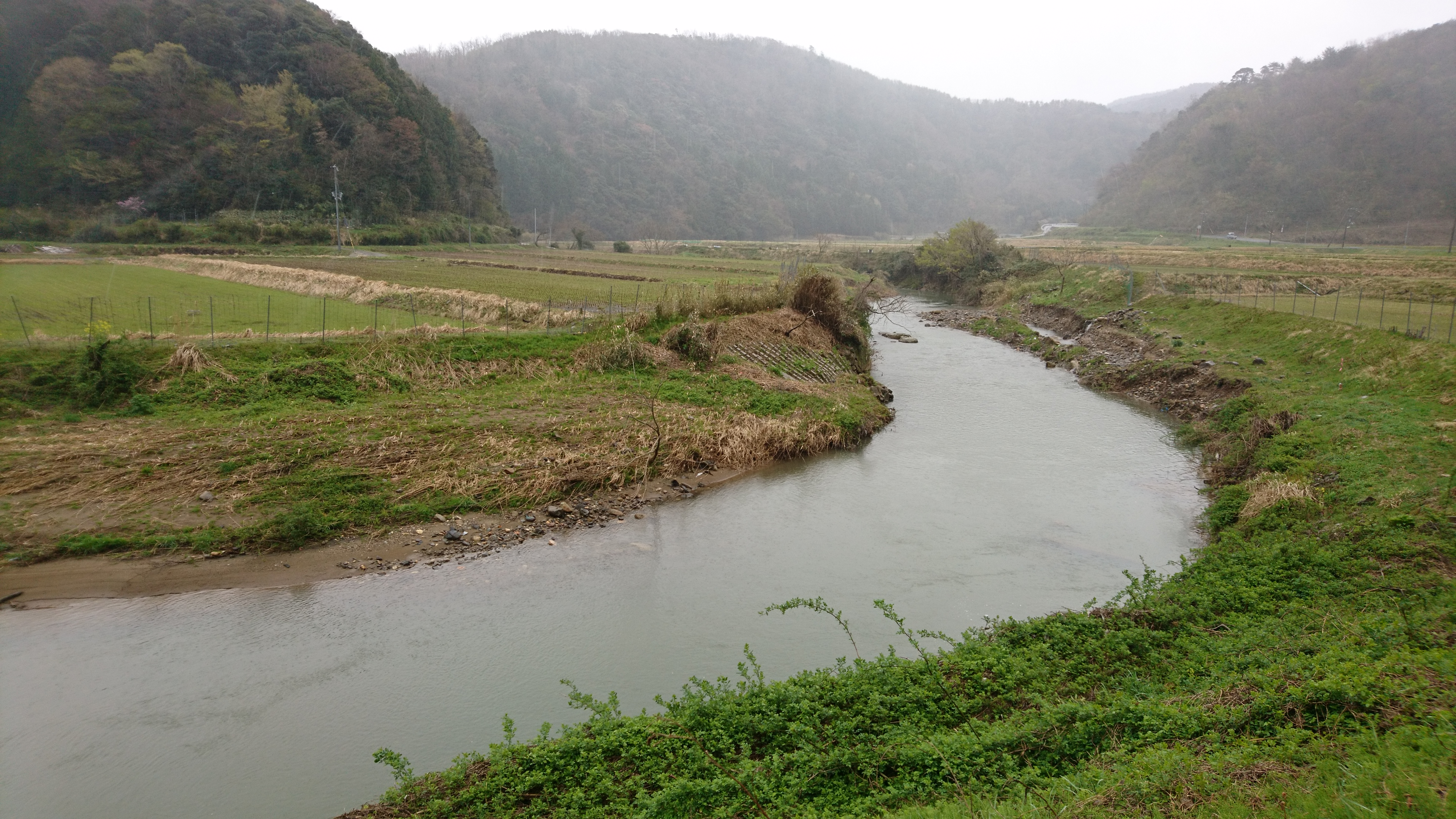 京都府伊根町を流れる筒川。丹後大仏から約１キロメートル下流にて撮影。